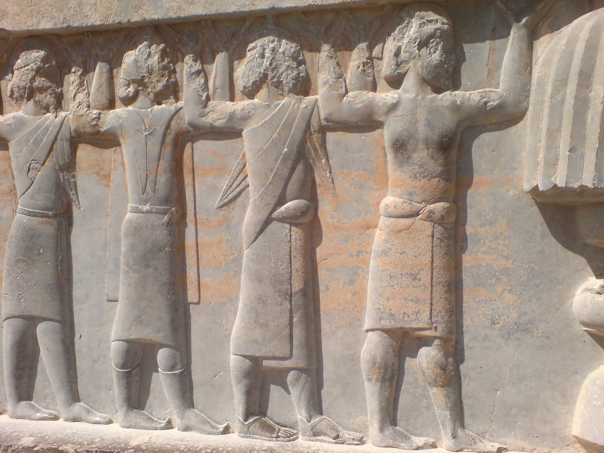 دیوار تخت جمشید - ساتراپ‌ها